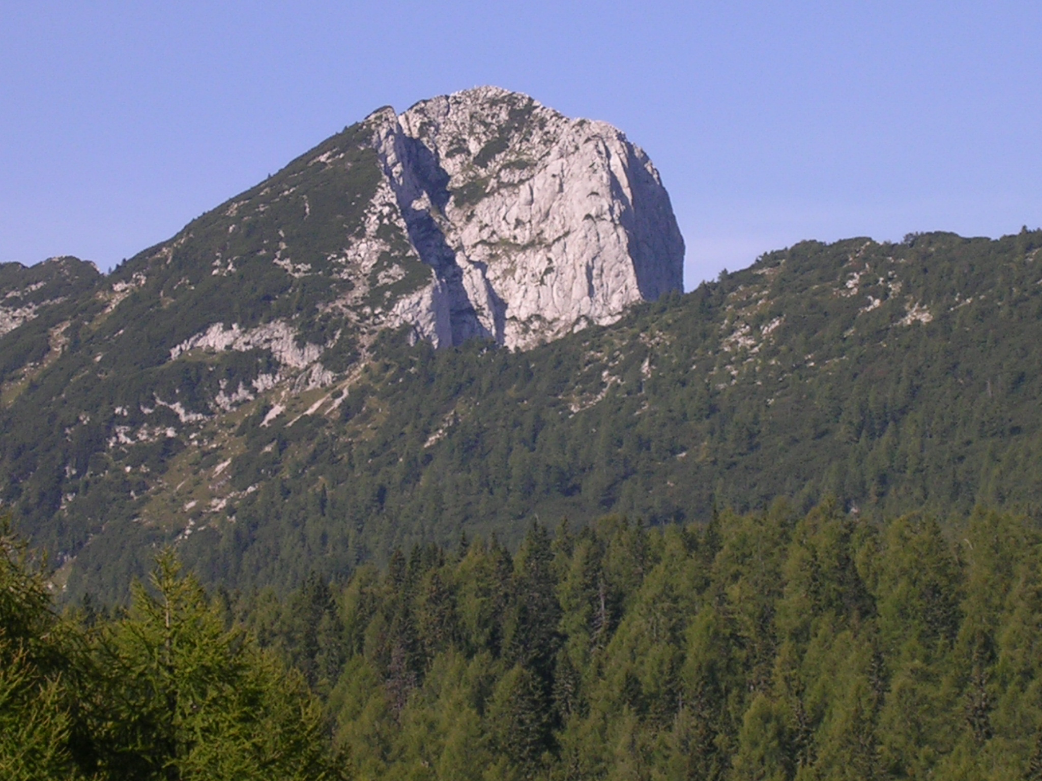 Debela peč, Slovenia mount